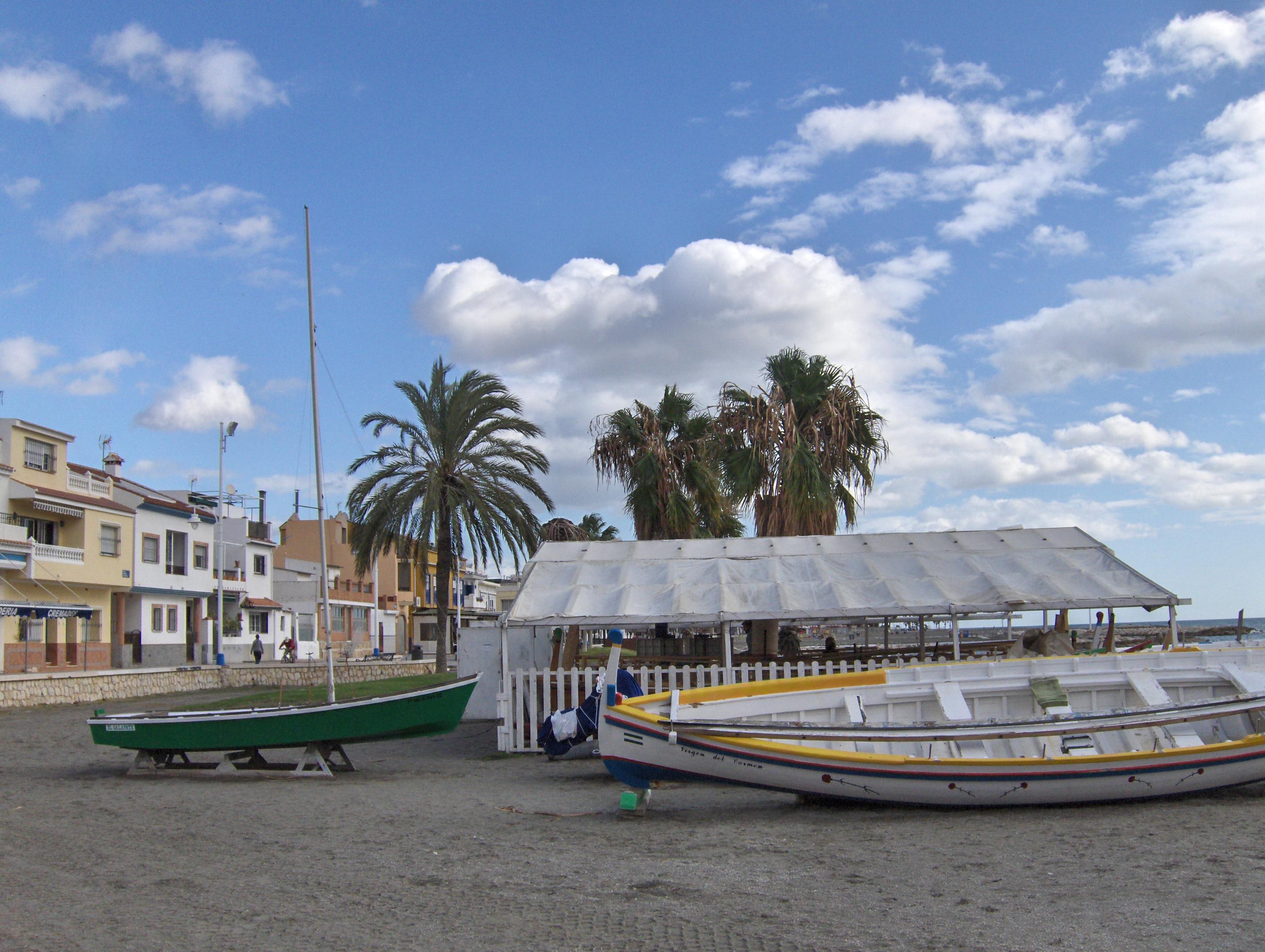 Embarcaciones en la playa de Pedregalejo, Málaga.